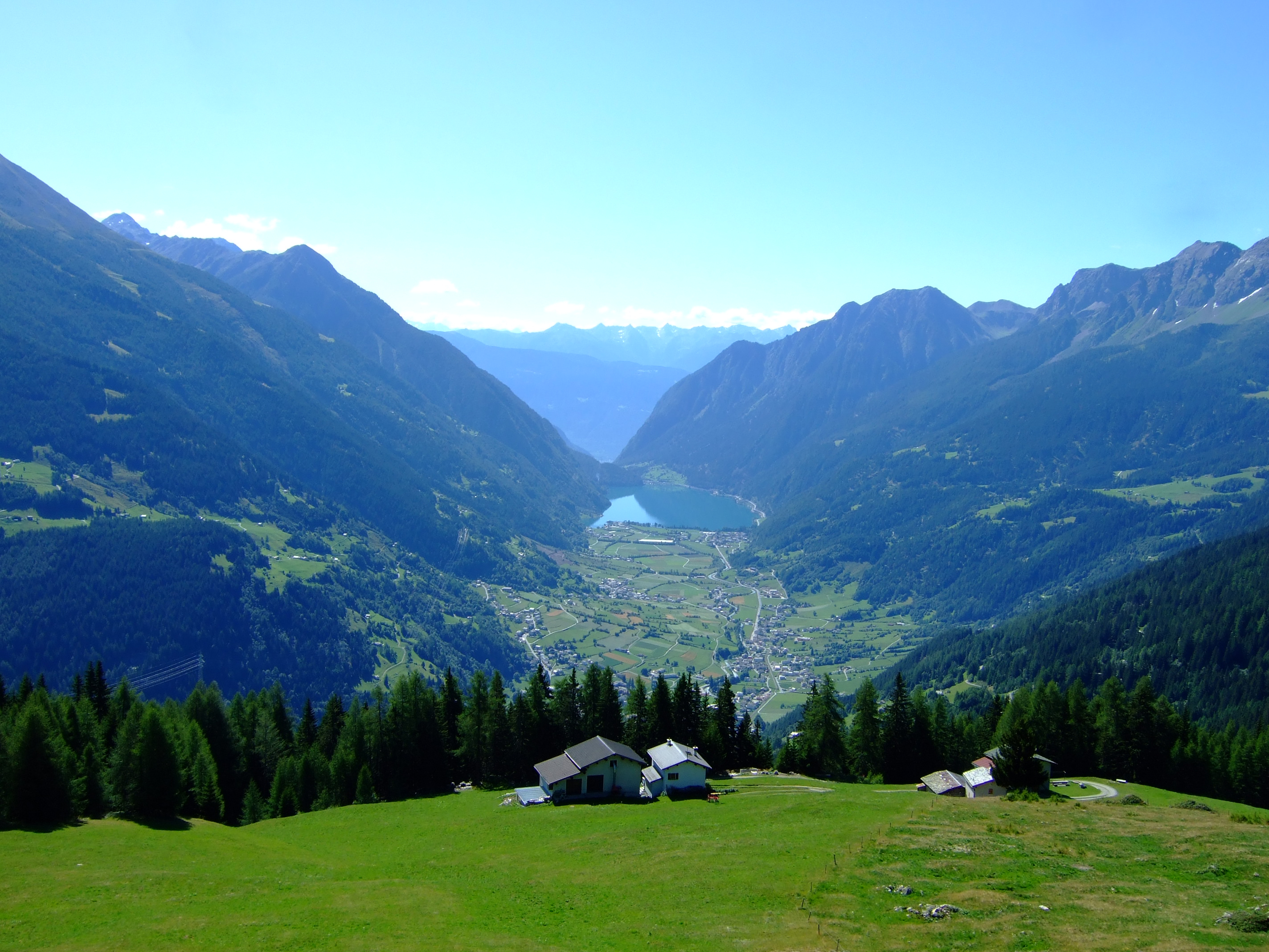 Blick ins Val Poschiavo von Alp Varuna, August 2008